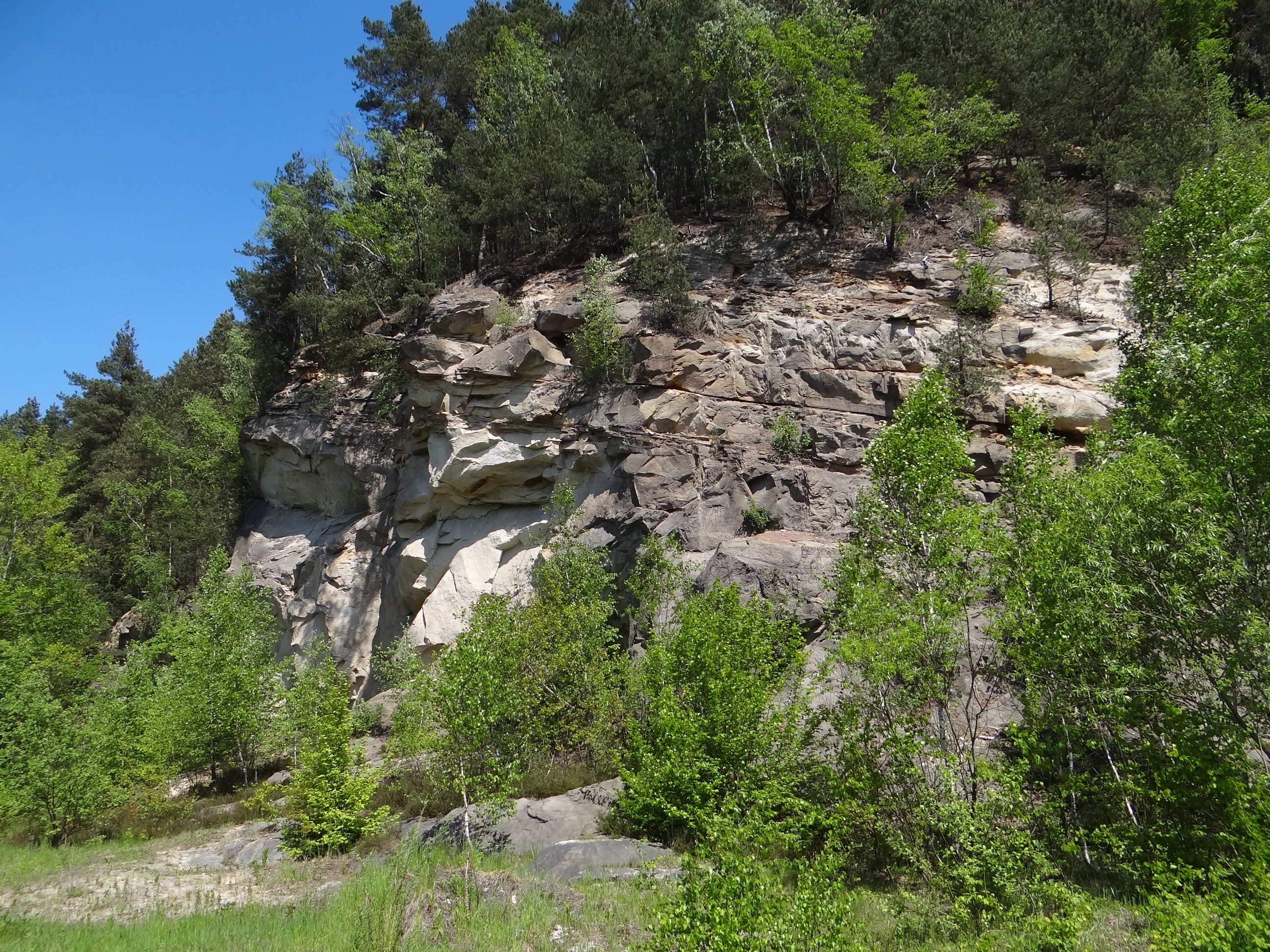 Kamieniołom w Ostruszy